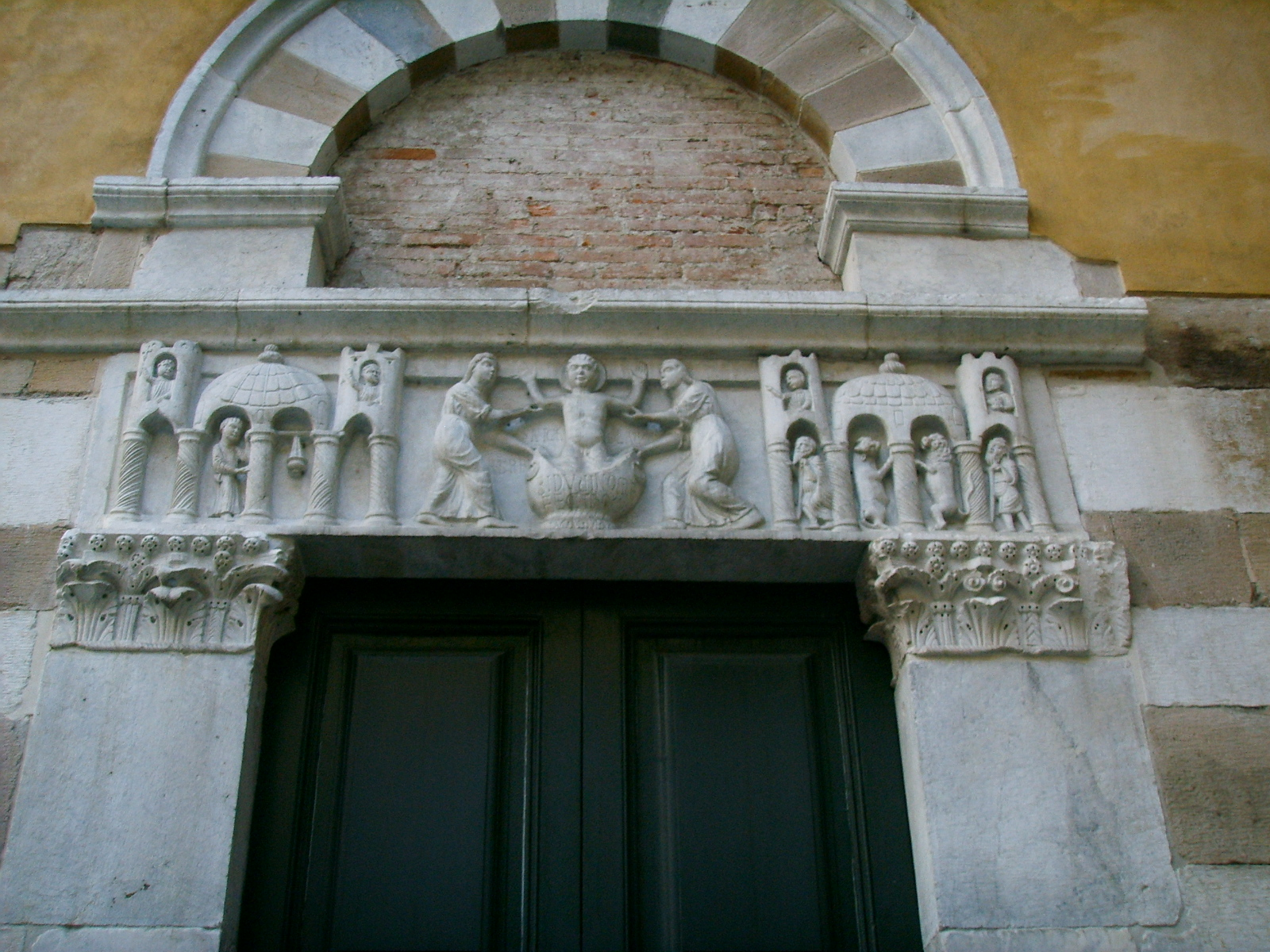 Chiesa di san salvatore, lucca 05 archirave biduino